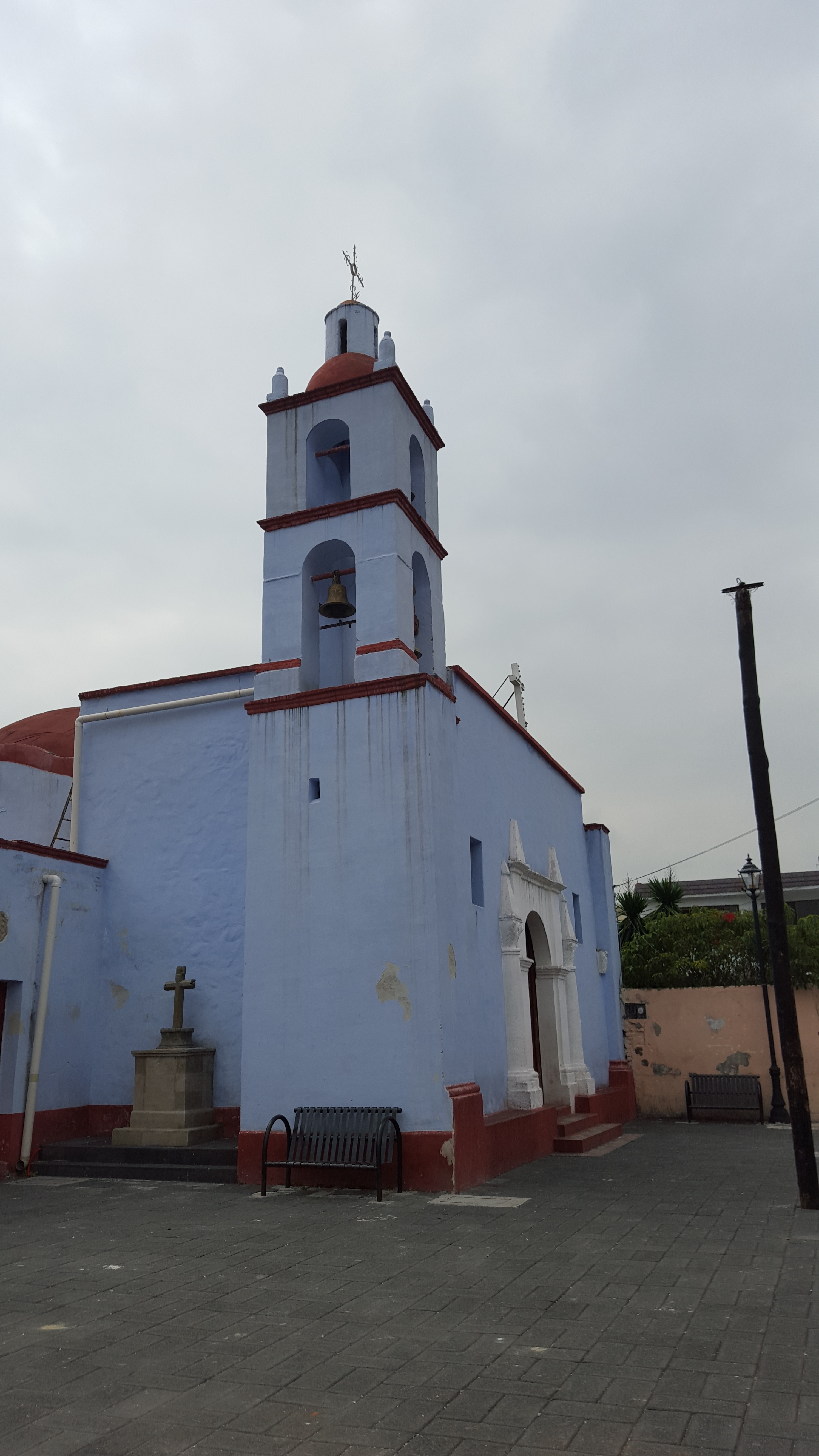 Ángulo lateral de la capilla de Belén donde se observa parte de la fachada lateral, la torre del campanario y la fachada frontal.